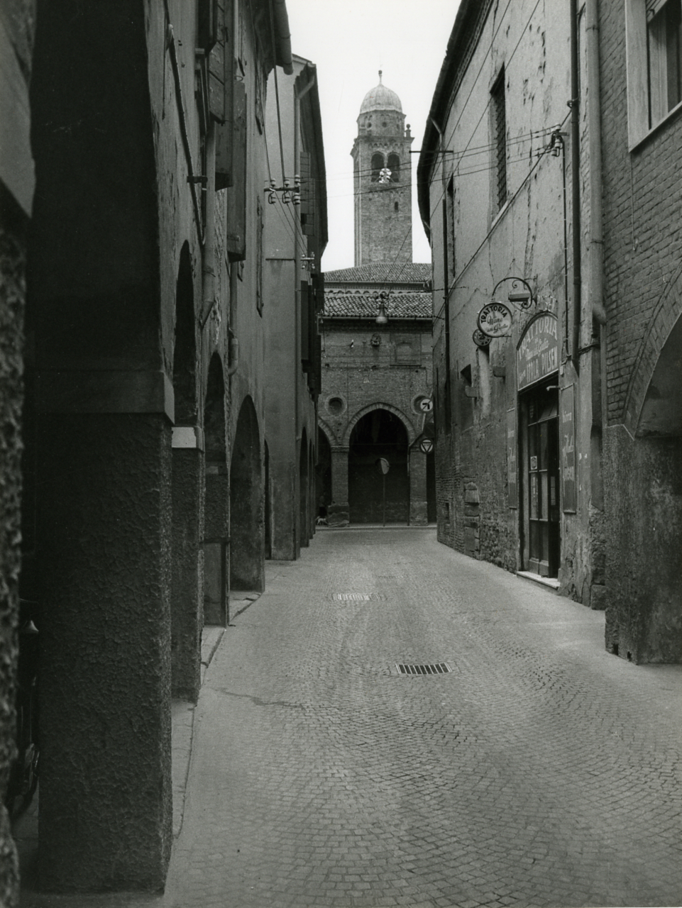 Padova. Case e vie. Via Santa Sofia con la Chiesa di San Francesco. . Servizio fotografico : Padova, 1967 / Paolo Monti. - Stampe: 4 : Positivo b/n, gelatina bromuro d'argento/ carta, 18x24. - ((Al verso delle stampe manoscritti i numeri dei negativi corrispondenti (formato 35 mm): 370, 375 (lo stesso numero identifica 2 stampe), 395; iscrizioni didascaliche manoscritte a matita; timbro a inchiostro con copyright: "© - Credit to:/ Paolo Monti/ Via T. Tasso [...]/ Milano [...]". - Sul coperchio della scatola iscrizione didascalica manoscritta a pennarello nero: "Emilia - Bologna". - Occasione: Documentazione per la pubblicazione: Diego Valeri (a cura di), "Padova: i secoli, le ore", Bologna, Edizioni Alfa, 1967. - Fonte: Monografia di Valeri Diego (a cura di): Padova: i secoli, le ore, Bologna, Edizioni Alfa (1967). - Fonte: Agenda di Paolo Monti: Monti/ 3 aprile 1966 - 9 marzo 1971/ 12421-16823 (1966-1971), presso Archivio Paolo Monti